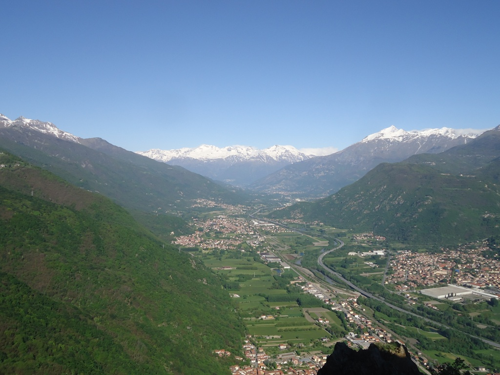 Immagine della bassa Valle di Susa